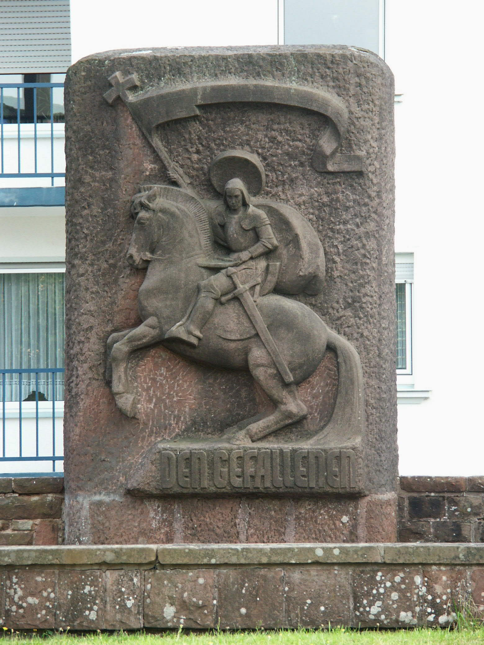 War Memorial - Krieger-/Kriegsopferdenkmal - Mémorial de guerre 1939-1945